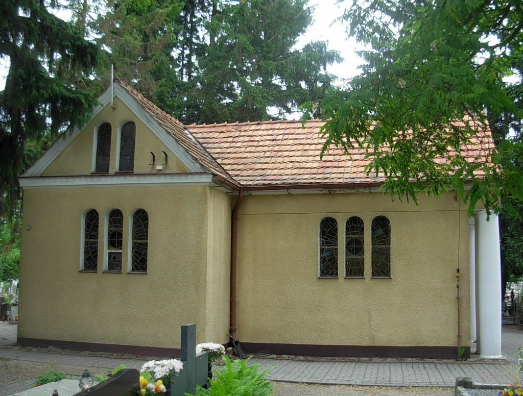 Cmentarz św. Mikołaja Bydgoszcz - kaplica